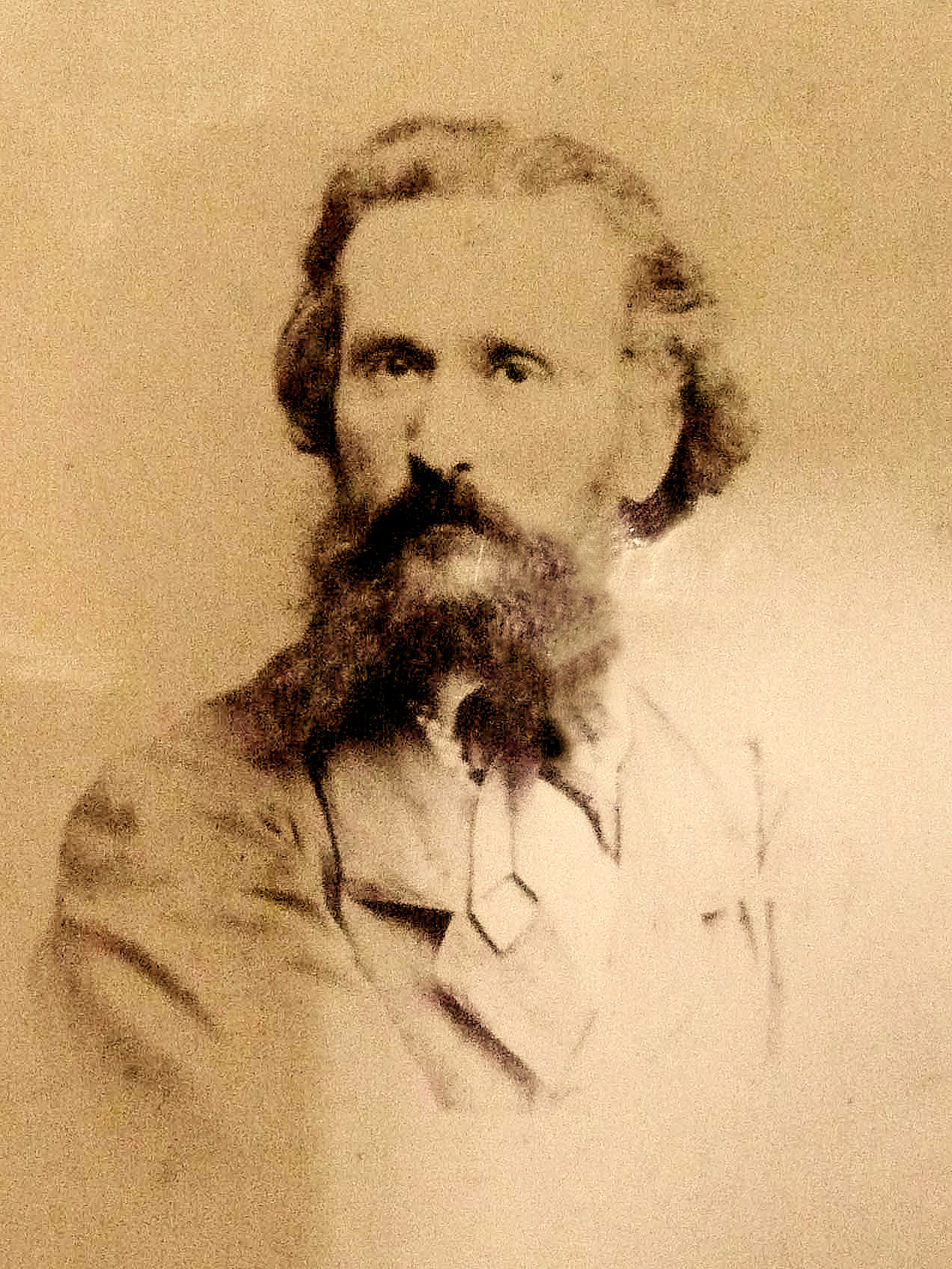 Jean Brunet, co-fondateur du Félibrige avec Frédéric Mistral